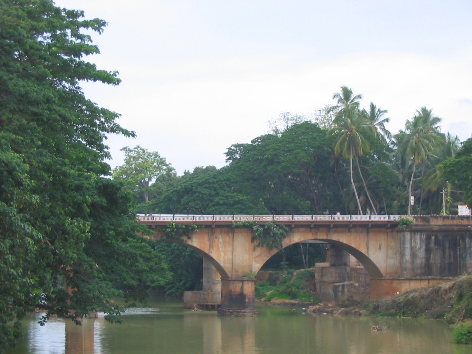 കരമന പാലം